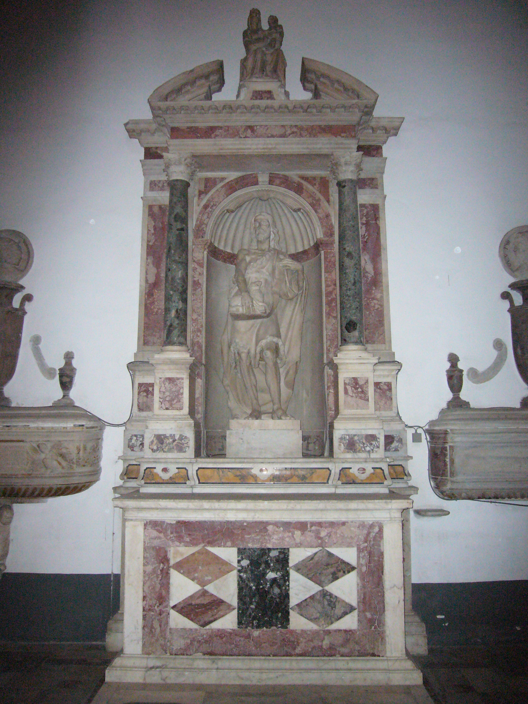 Napoli, san Domenico Maggiore: cappella di san Giovanni Battista - san Govanni di Domenico D'Auria (1593)